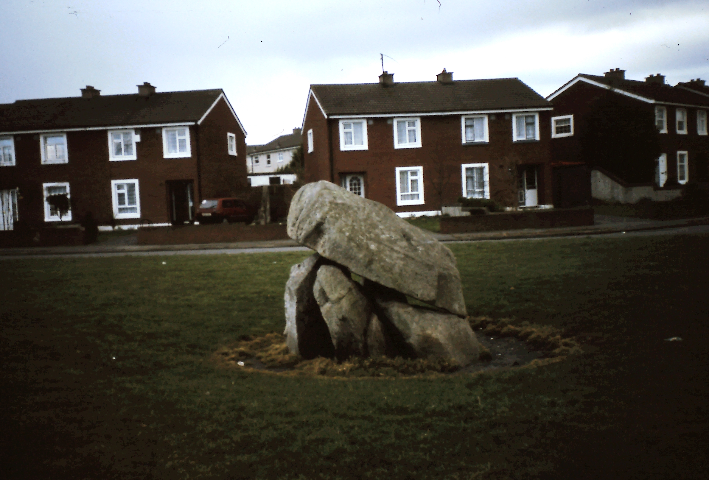 .Ballybrack Portal Tomb